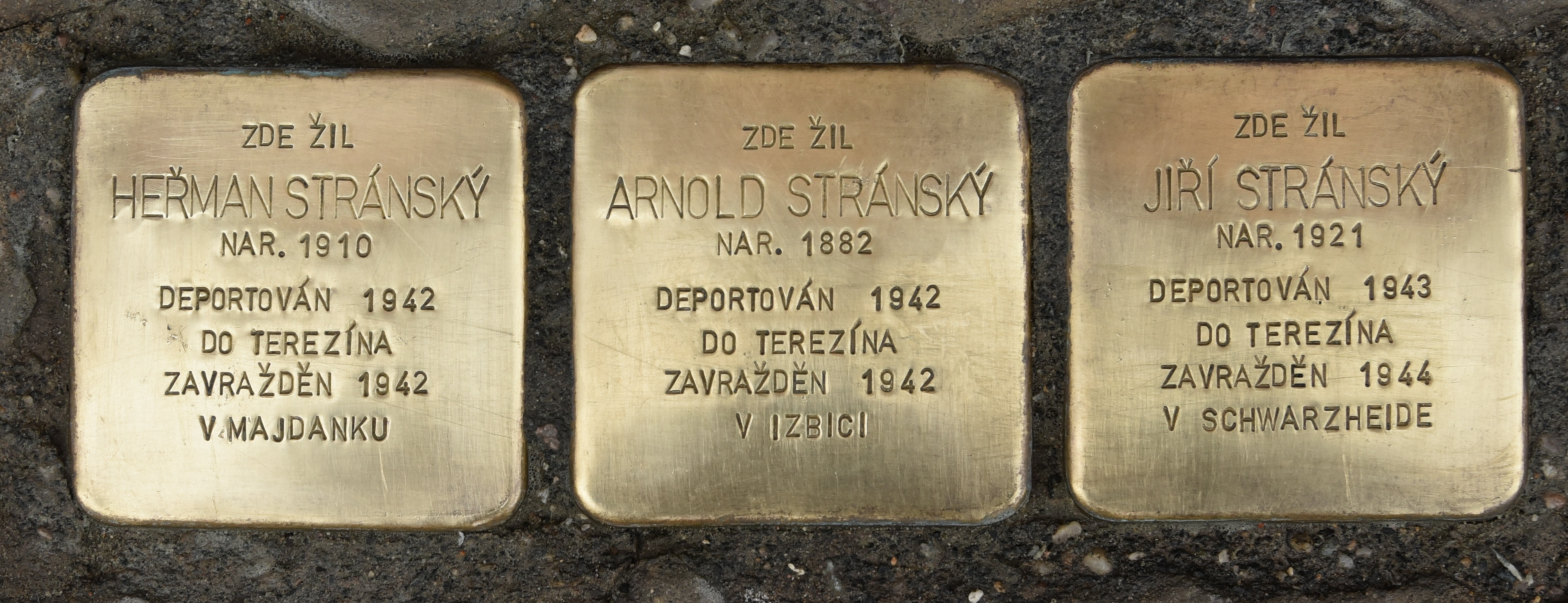 Drei Stolpersteine für Familie Stránský in Tišnov, Brněnská 9